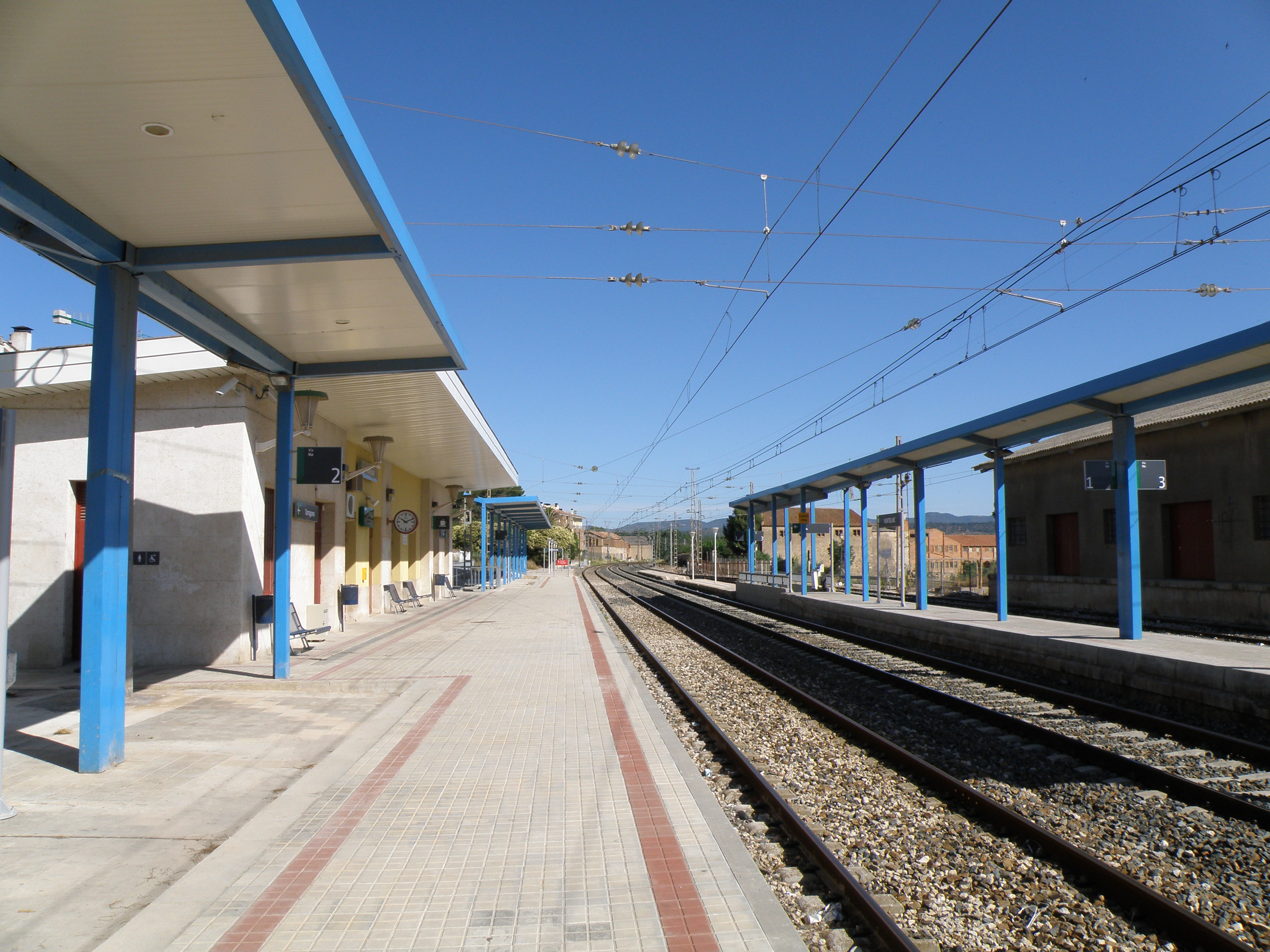 Estació de tren de Montblanc, a la conca de Barberà, Tarragona.